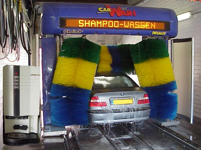 carwash